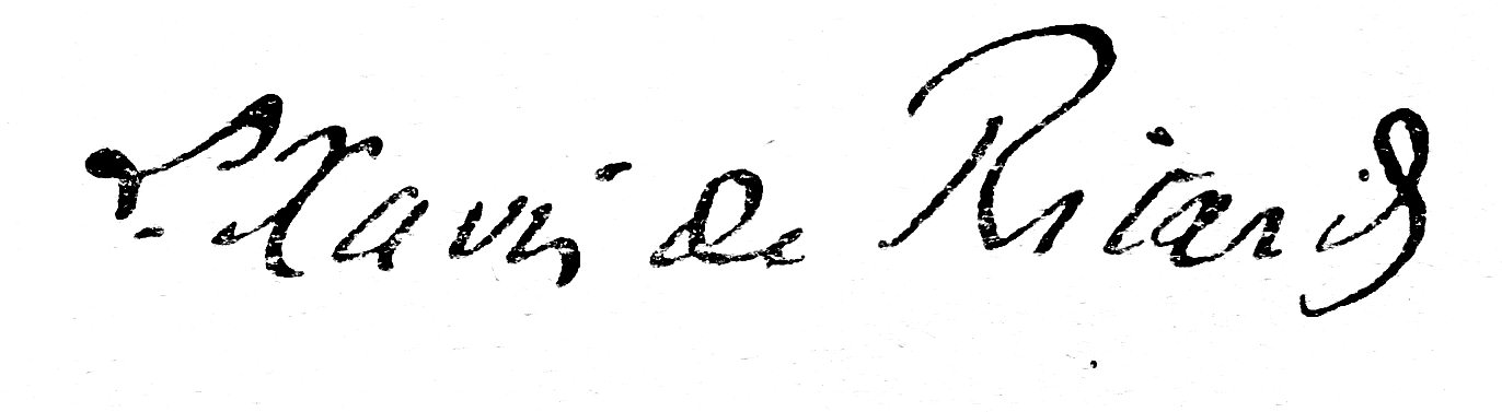 Signature Louis-Xavier de Ricard